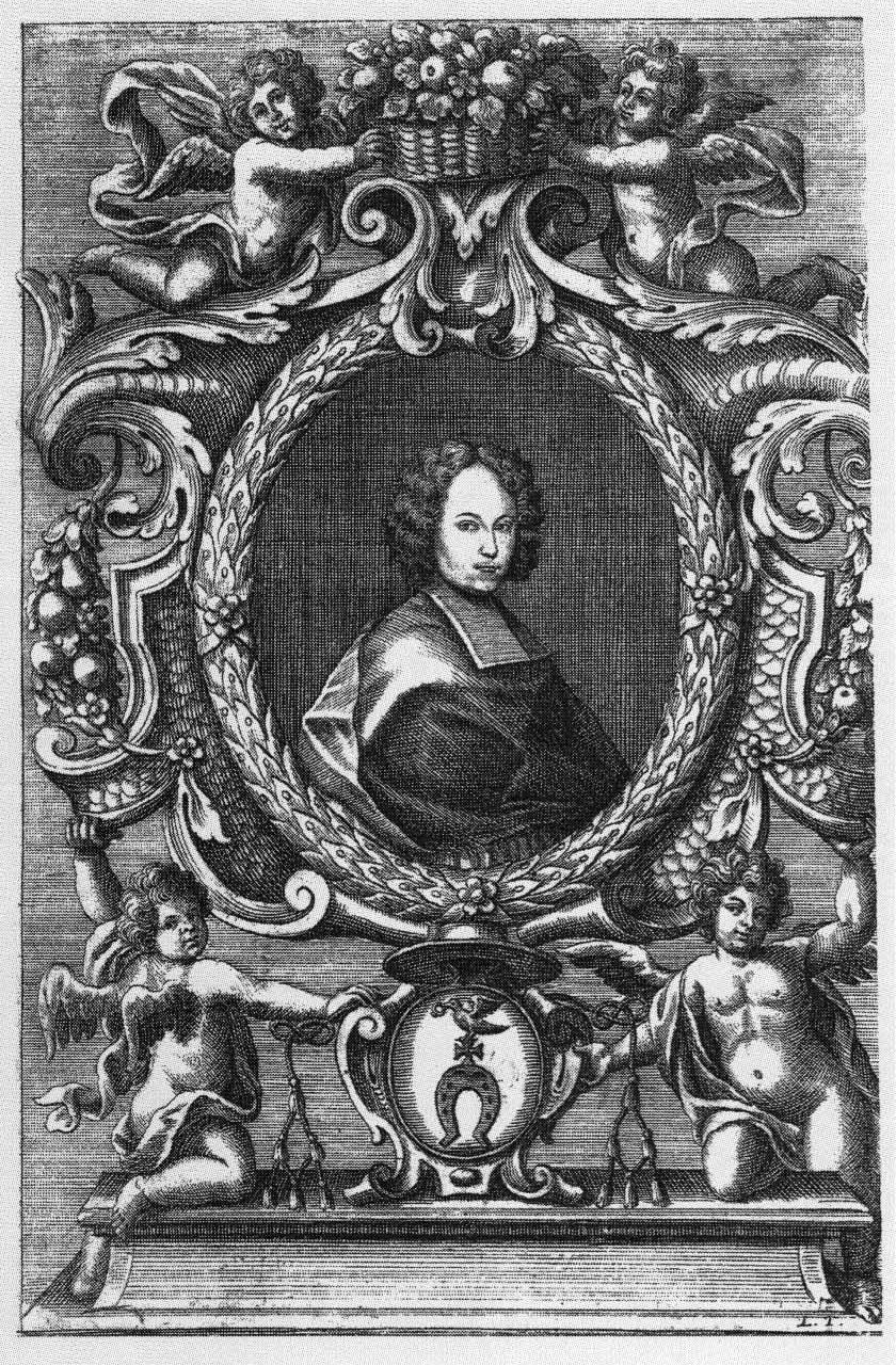 Партрэт Б. ГасеўскагаБеларуская (тарашкевіца): Багуслаў Корвін-Гасеўскі